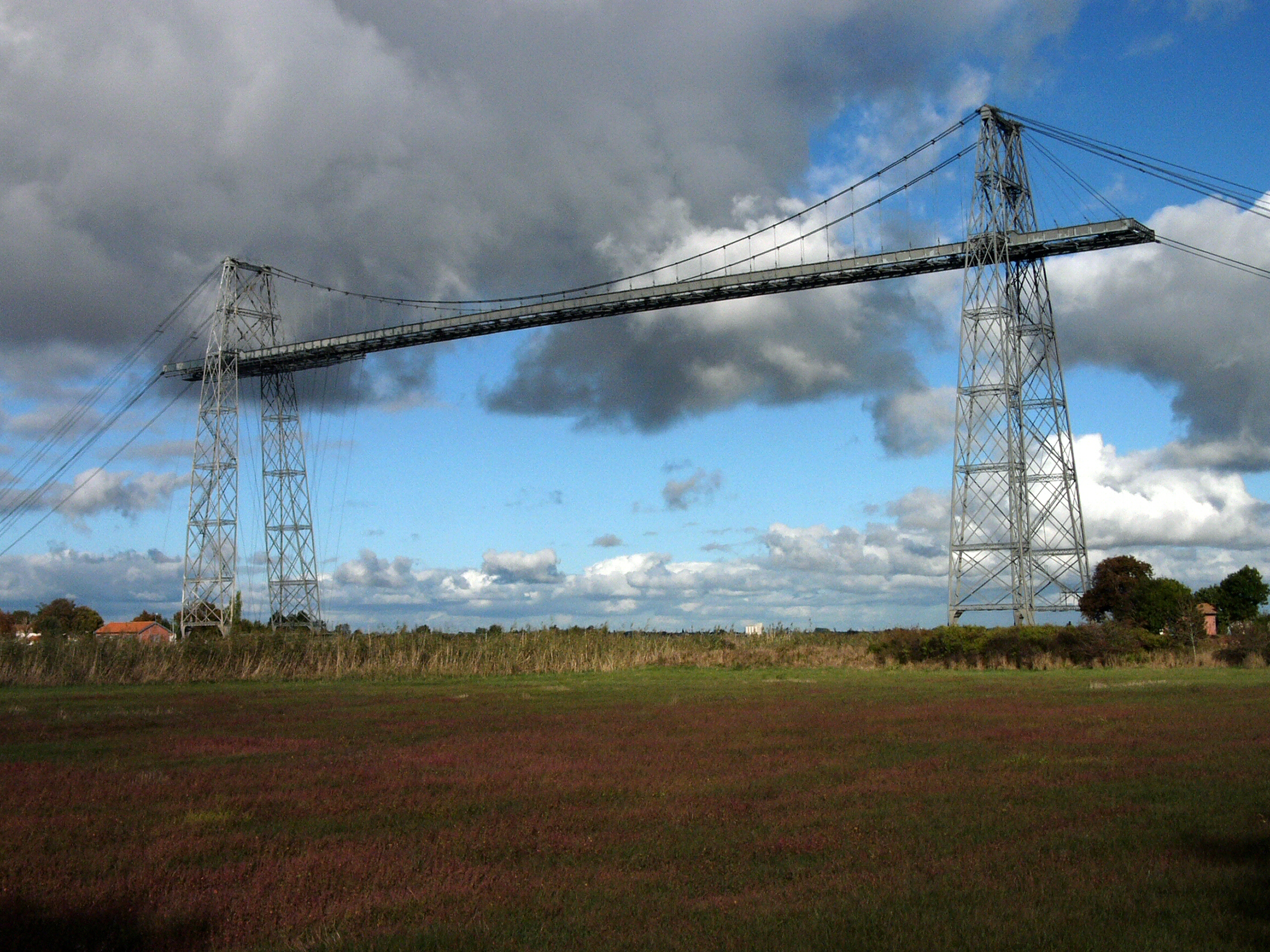 Pont Transbordeur de Martrou Rochefort Charente Maritime France